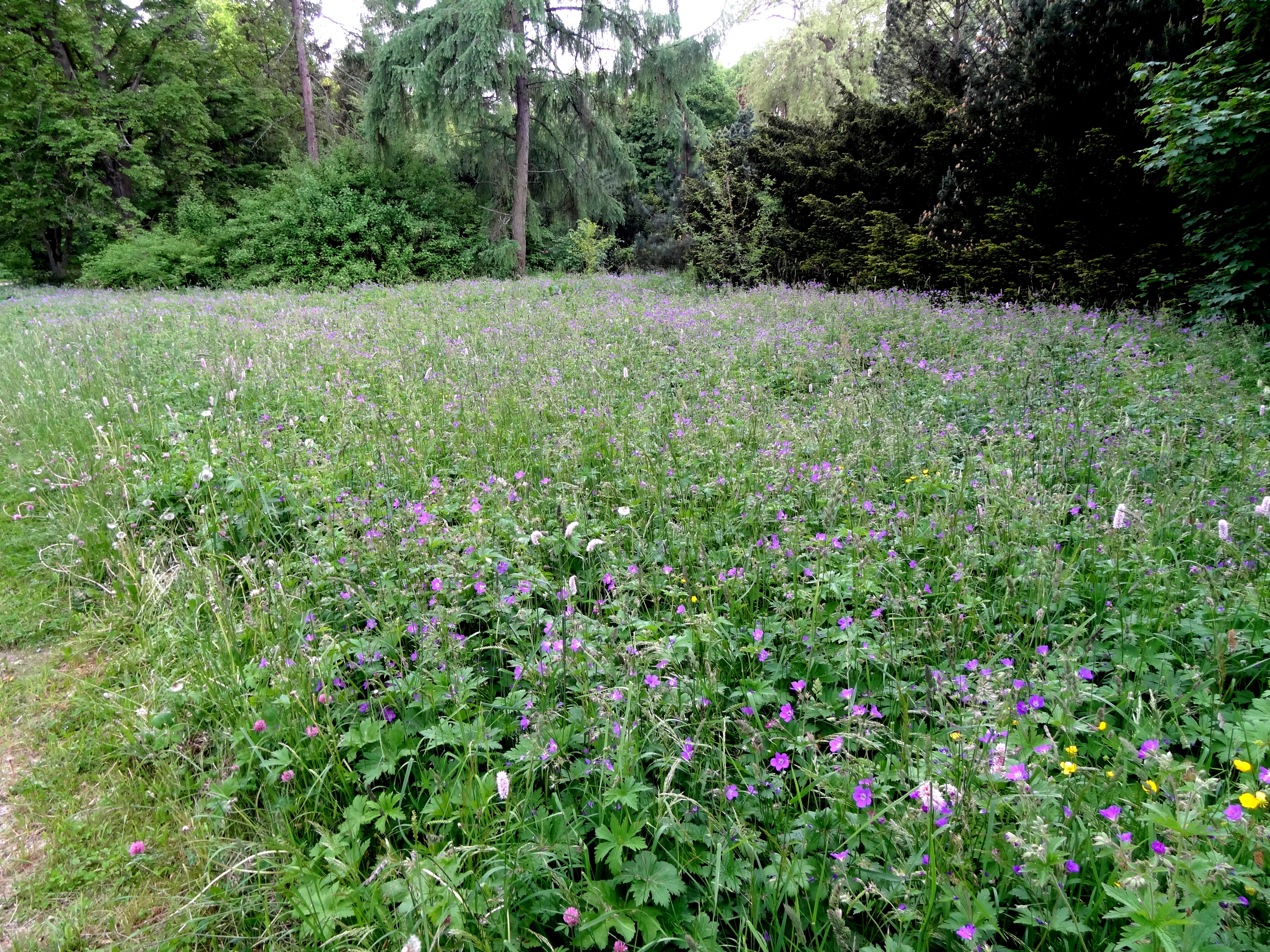 Geraniaceae, Wald-Storchschnabel, Deutschland, Bayern, Oberfranken, Hof, Theresienstein Foto: U.Schmidt, 6.V.2013